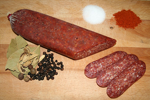 Lukanka in its bulgarian version.